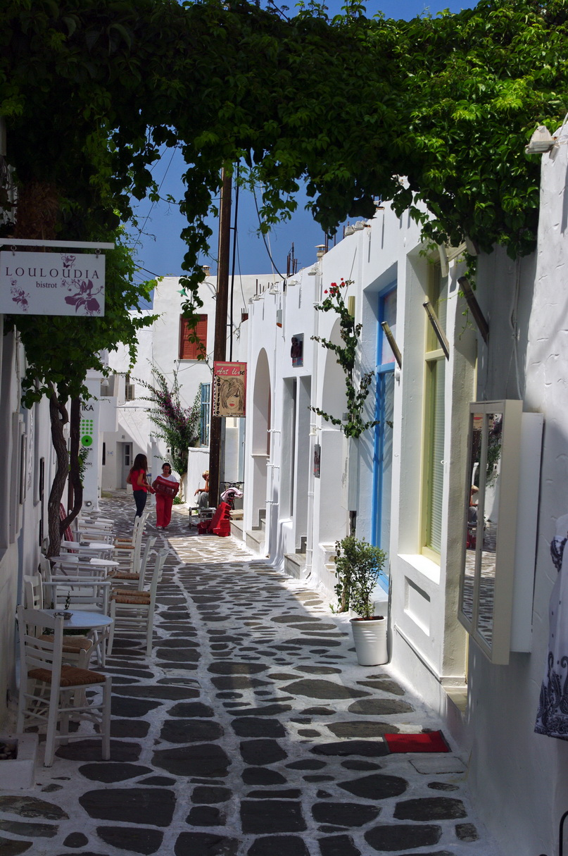 Gasse in Naoussa